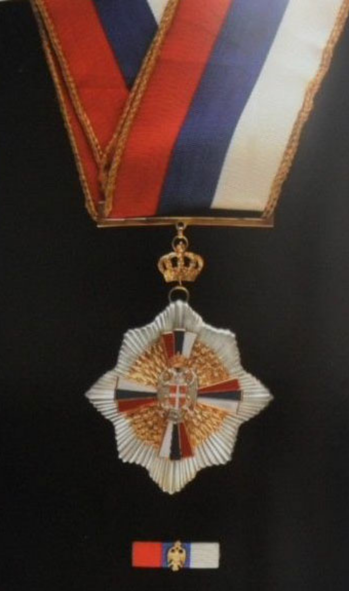 Srpski (latinica): Orden zastave Republike Srpske sa zlatnim vijencem